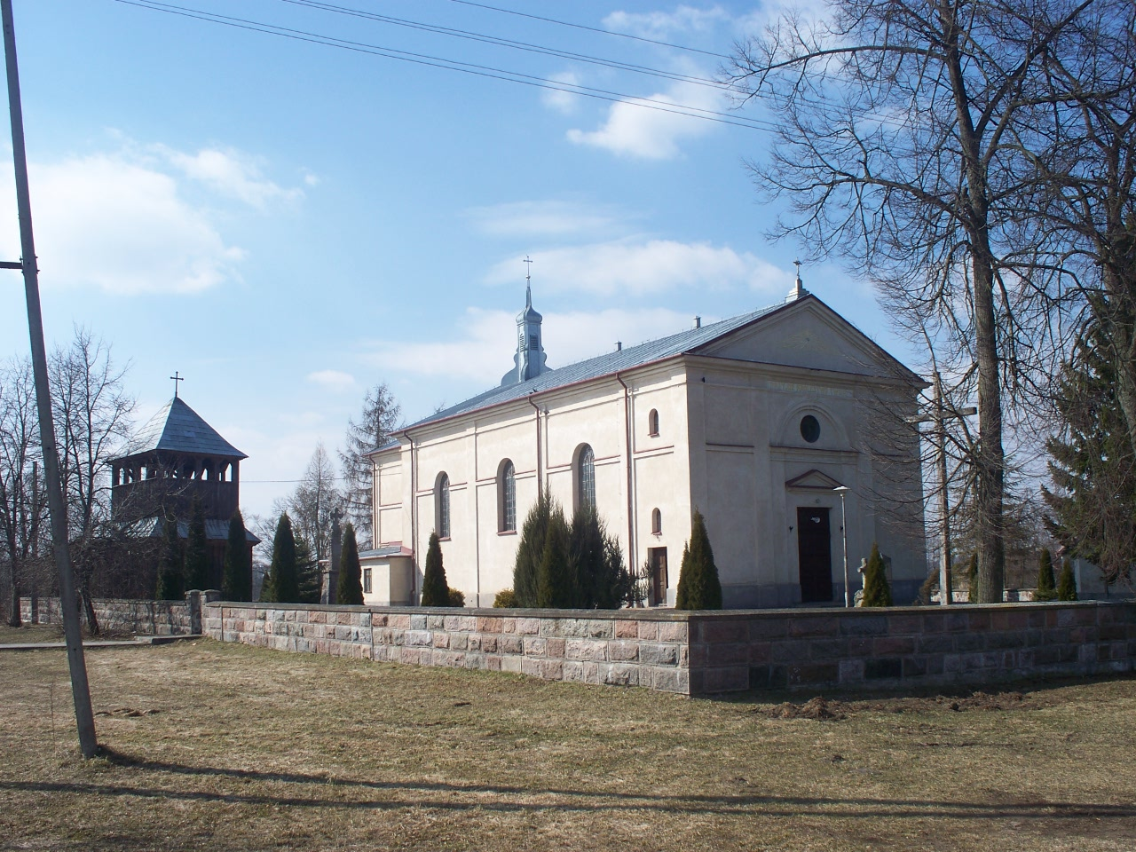 Wzniesiony w 1875 r. wg projektu arch. Leandra (?) Marconiego, z poprawkami wzniesionymi przez arch. Stanisława Kucharzewskiego, ówczesnego budowniczego powiatowego w Wysokiem Mazowieckiem ; budowany z fundacji Aleksandra Kierznowskiego, właściciela majątku Szepietowa Wawrzyńców, staraniem ks. Jana Krassowskiego. Neoklasycy styczny. Murowany z cegły, tynkowany. Elewacją frontową zwrócona na wschód. ( Kałamajska –Saeed M. Katalog Zabytków Sztuki Województwa Łomżyńskiego, Ciechanowiec, Zambrów, Wysokie Mazowieckie i okolice. Seria Nowa, Tom IX zeszyt 2. Polska Akademia Nauk i Instytut Sztuki, Warszawa 1986 r. s. 33. )